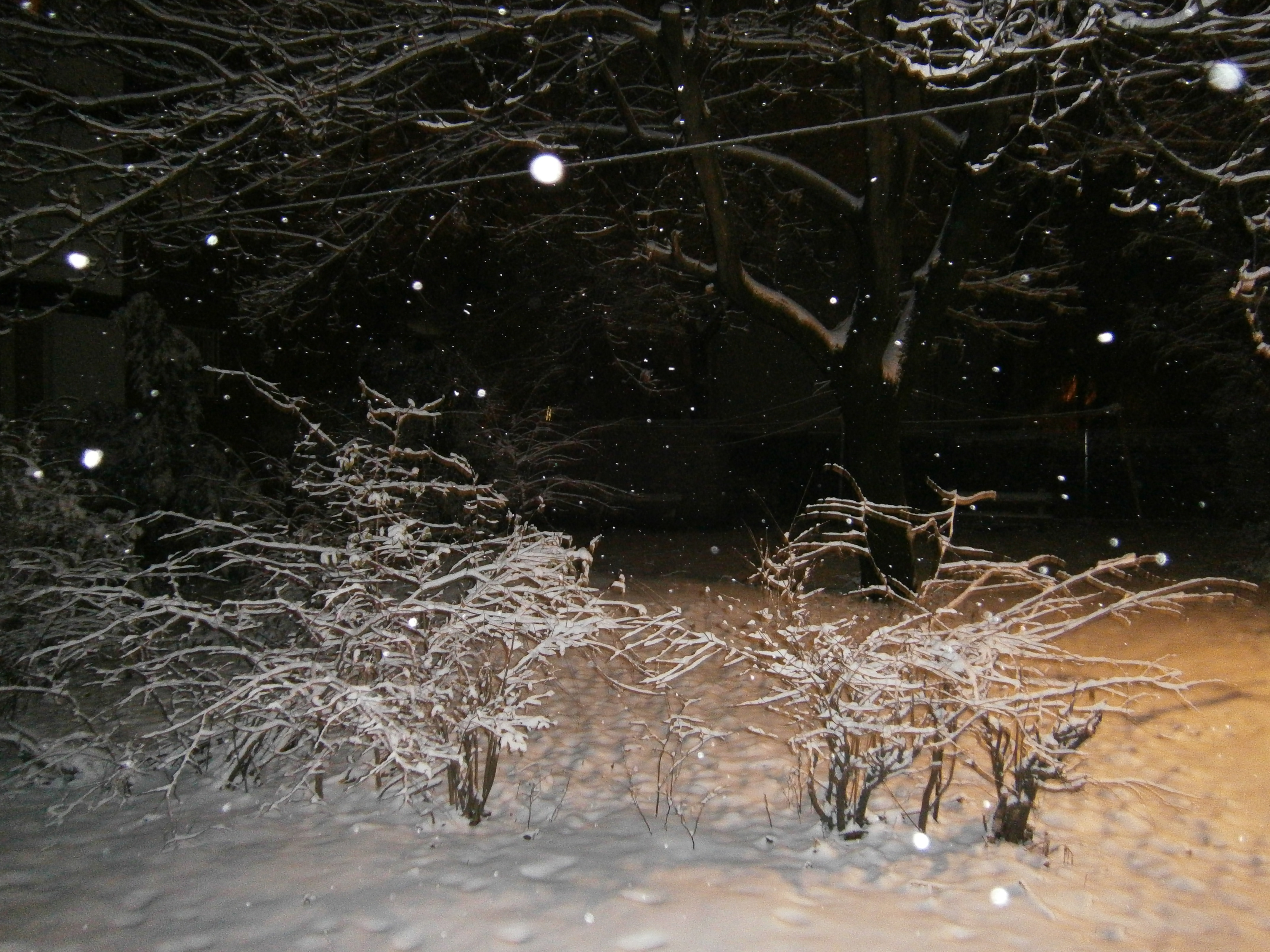 Evening with snow in Budapest